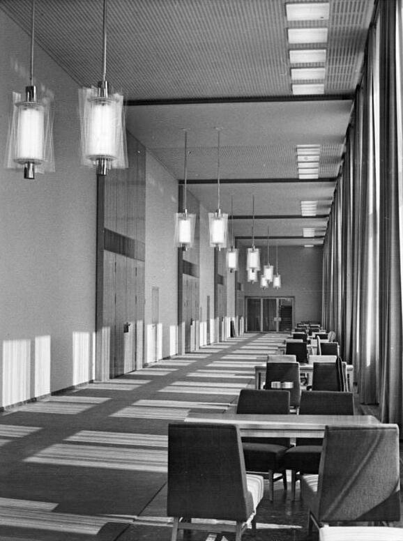 Berlin, Staatsratsgebäude, Wandelhalle Zentralbild Quaschinskyinsky-Qua-At.-1.10.1964 Der Amtssitz des Staatsrates. Am 3.Oktober 1964 wird der neue Amtssitz des Staatsrates am Marx-Engels-Platz in Berlin durch den Vorsitzenden des Staatsrates Walter Ulbricht übernommen.Das neue Gebäude demonstriert in seiner modernen und zweckmäßigen Ausführung den Leistungsstand der Republik auf diesem Gebiet.UBz: Die Wandelhalle im 2.Stock des Gebäudes.Von hier aus sind der Festsaal und der Bankettsaal zu betreten.